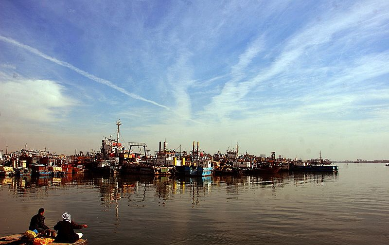 منظر لشط العرب في البصرة، وهو نهر يتكون من التقاء نهري دجلة والفرات، حيث يلتقي النهران في منطقة (كرمة علي) المدخل الشمالي لمدينة البصرة في حين كانا يلتقيان في مدينة القرنة على بعد 375 كم جنوب بغداد.